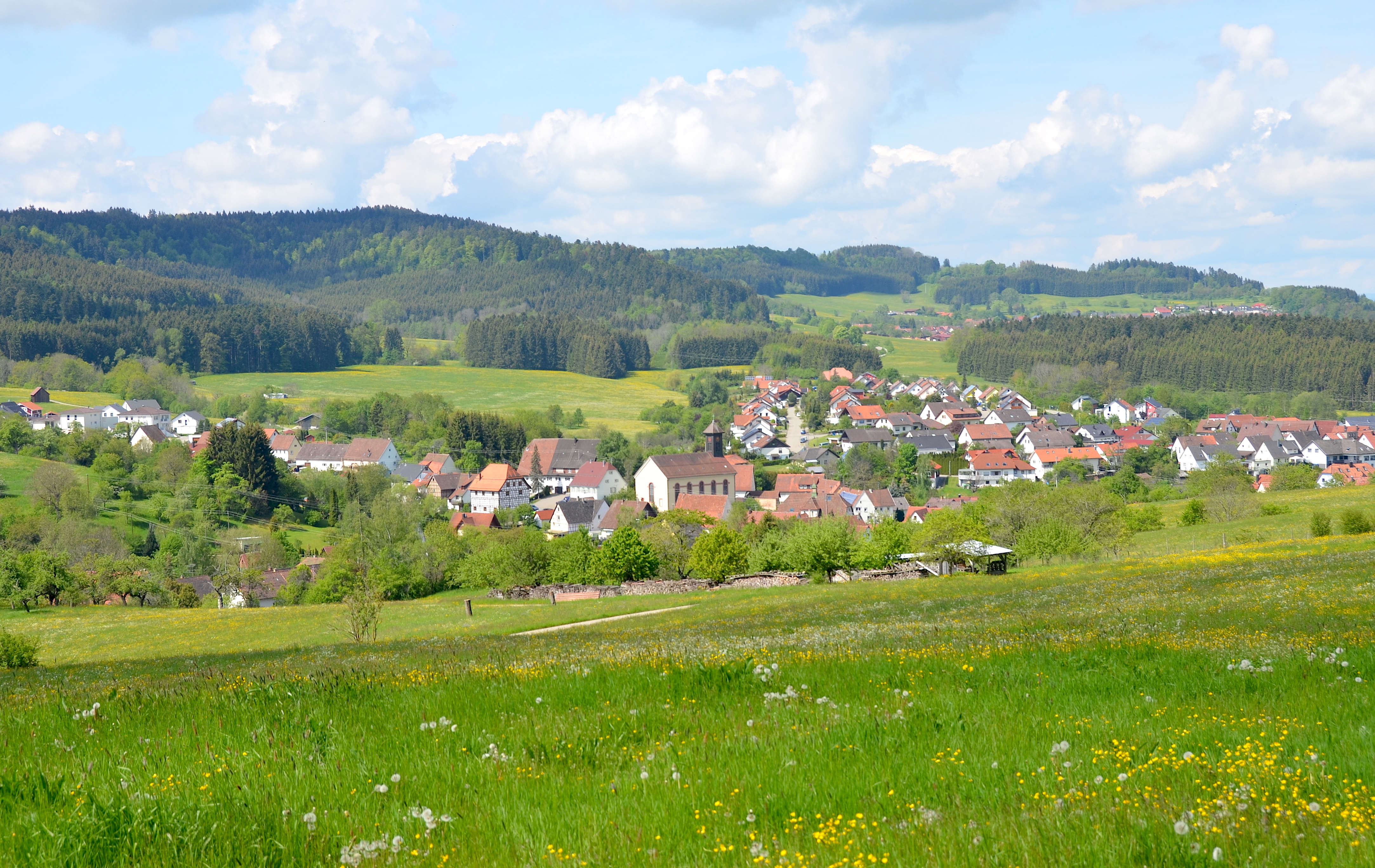 Blick über Ratshausen im Zollernalbkreis (2019)